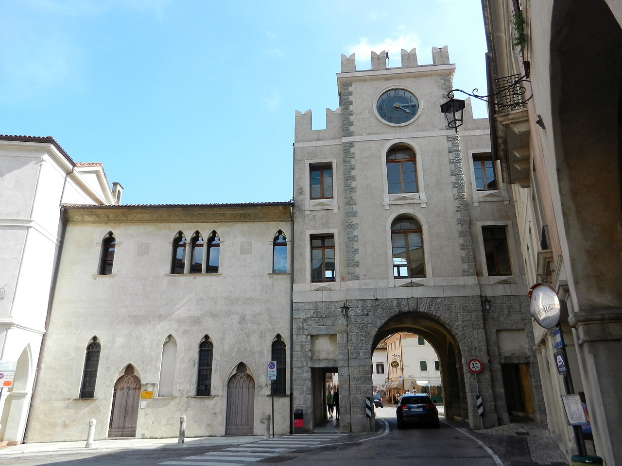 Vittorio Veneto (Serravalle) - Torre dell'Orologio